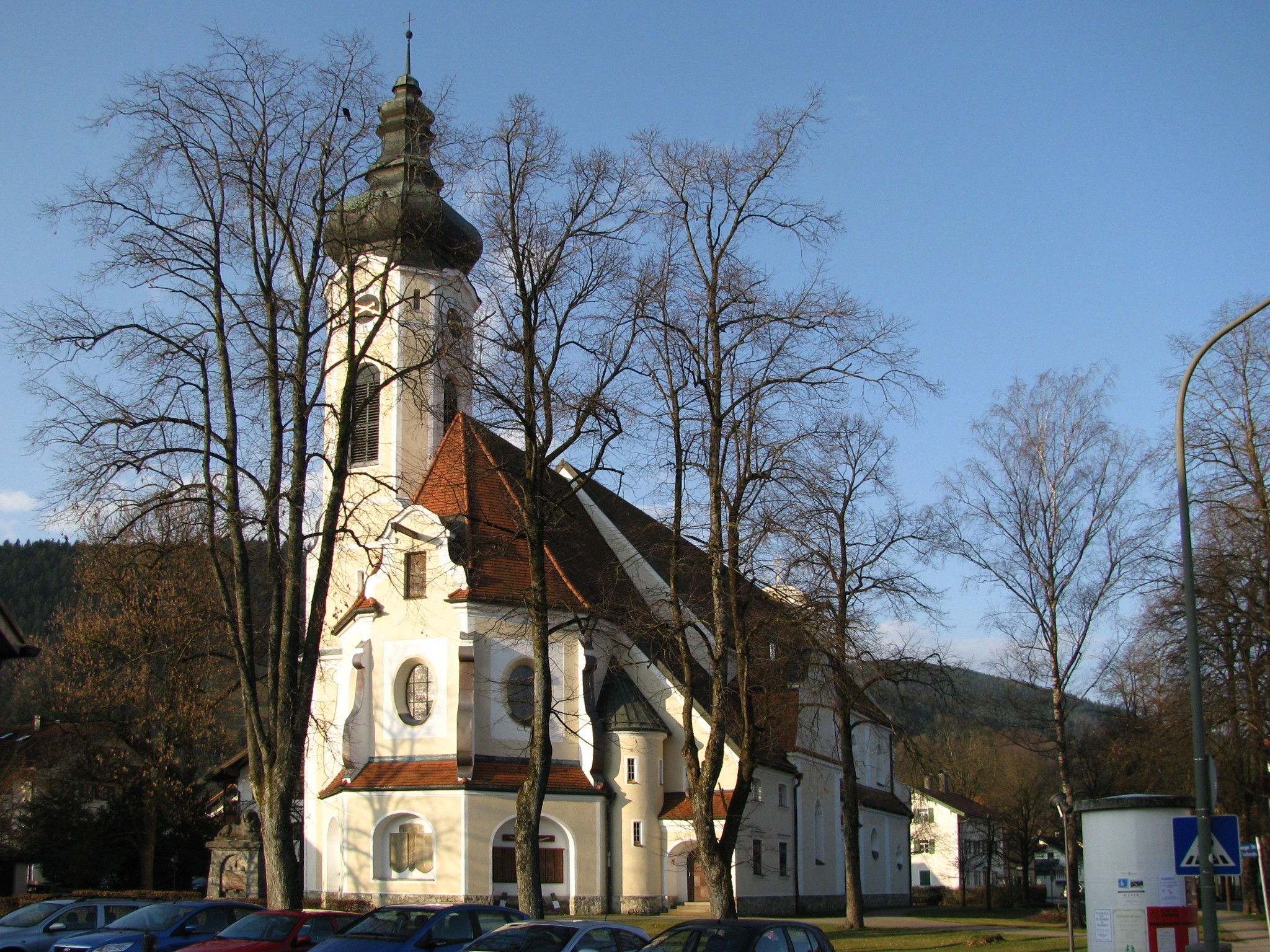 Kirche St. Anton in Hausham von Osten